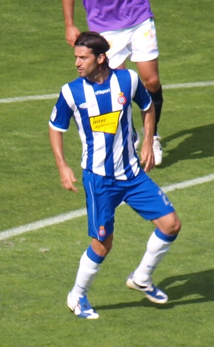 Daniel Jarque en el partido que enfrentó al RCD Español y al Málaga CF en el último partido de La Liga 2008/09 en el estadio Olímpico de Montjuic.